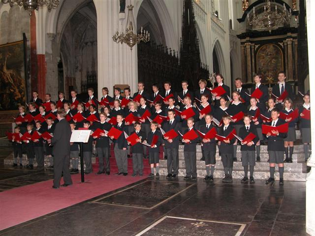 Foto gemaakt op het Jaarconcert 2005 in de antwerpse kathedraal door privefotograaf, online publiceerbaar